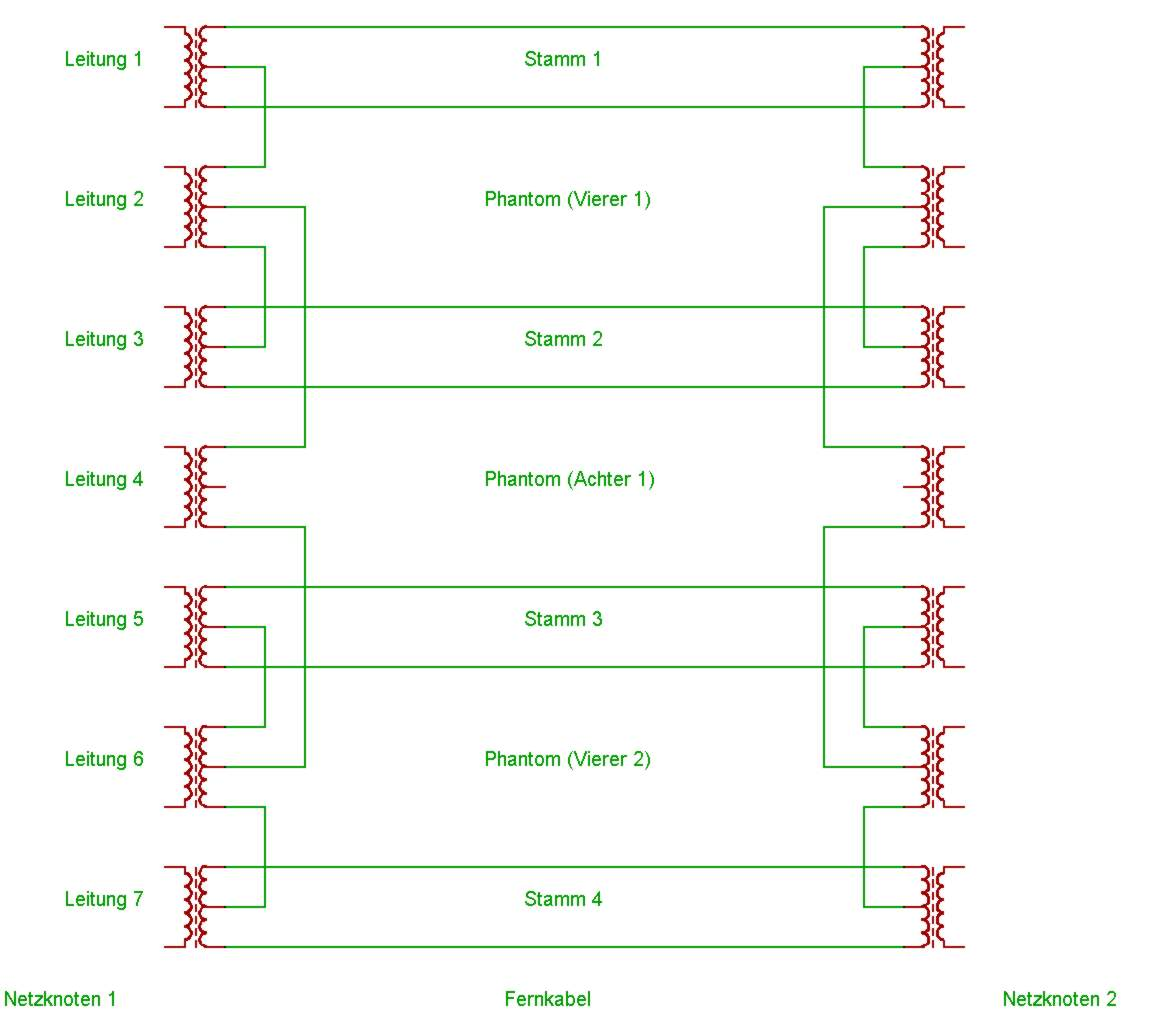 Phantomschaltung Nachrichtentechnik. Möglichkeiten zur Lizenzierung, bitte die nicht-benötigte Variante aus dem Code löschen